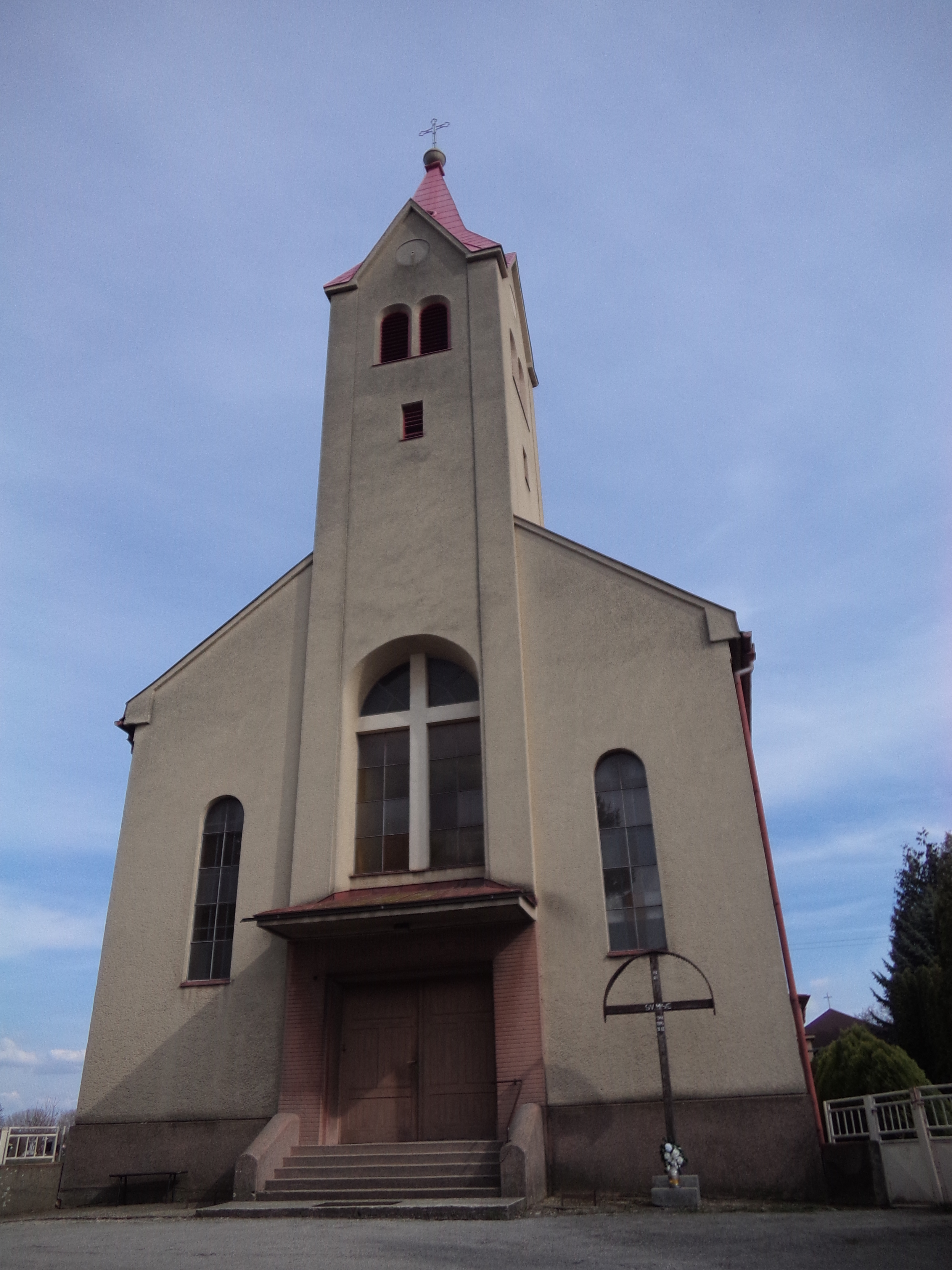 Mellek templom